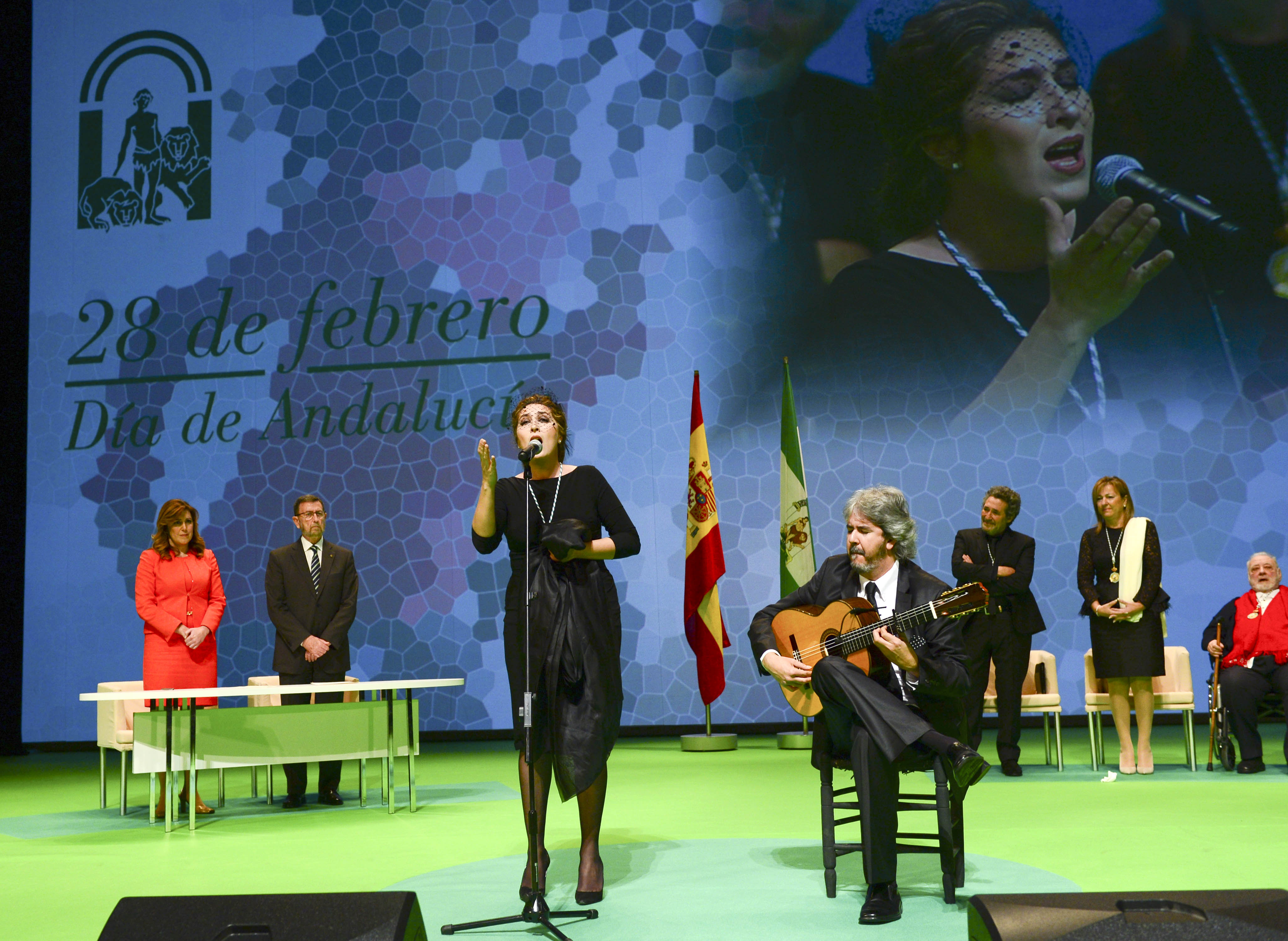 Estrella Morente cantando el himno de Andalucía